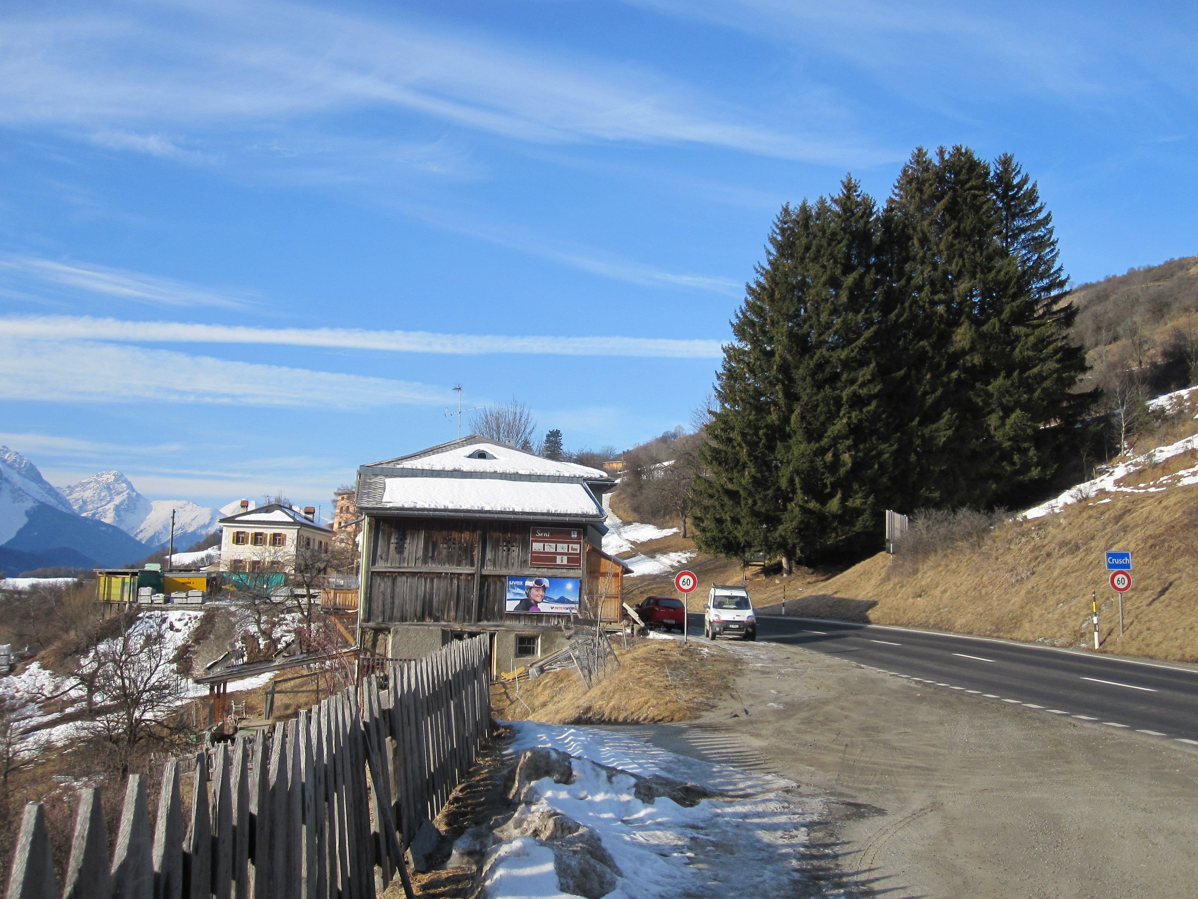 Crusch (politisch zu Sent GR gehörig)